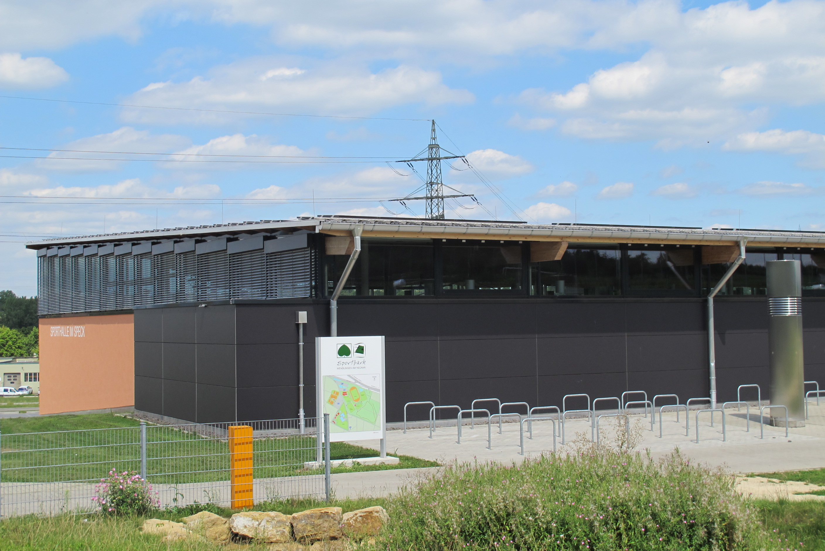 Sporthalle Im Speck für alle Sportinteressierten, Wendlingen am Neckar